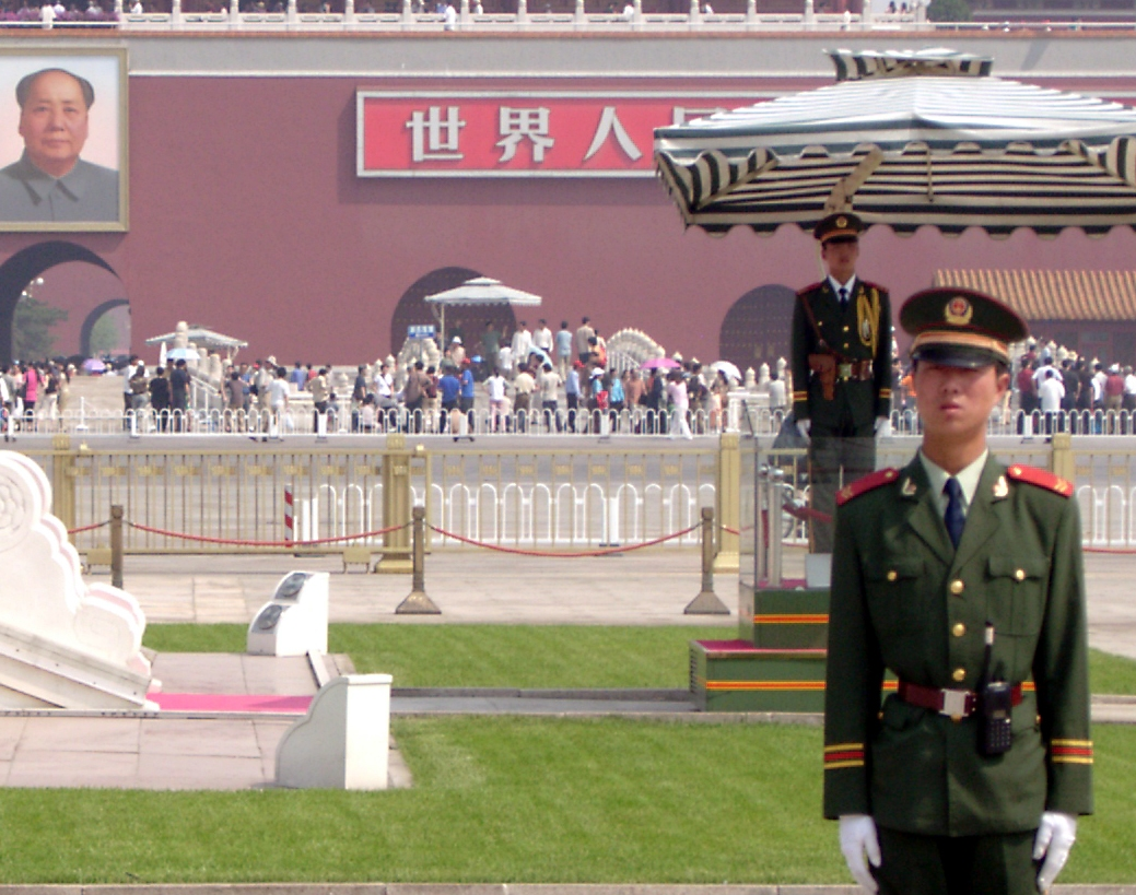 Tiananmen-Platz, Posten auf dem Posten auf dem Tiananmen-Platz in Peking